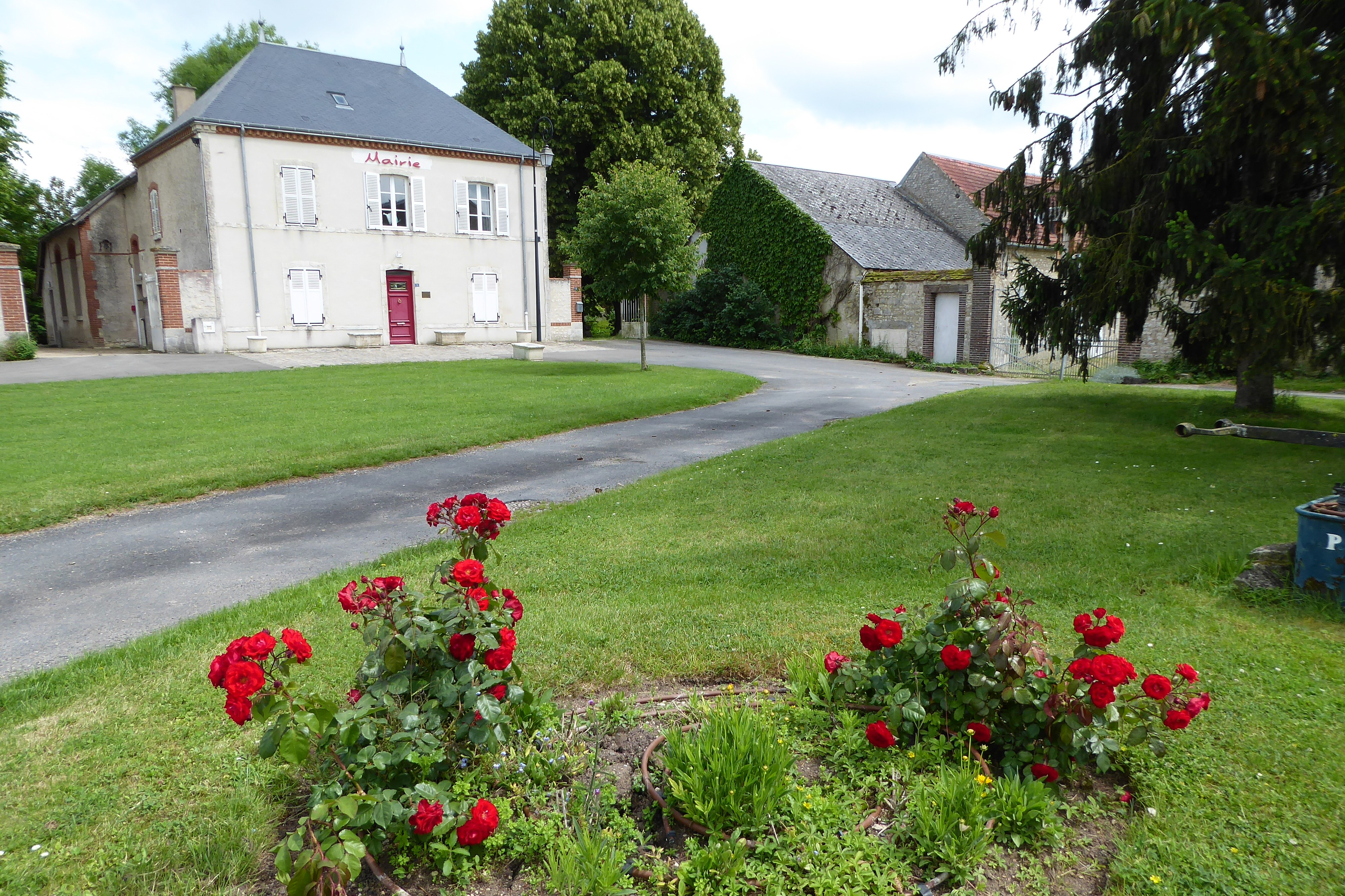 mairie de Poupry, Eure-et-Loir, France.